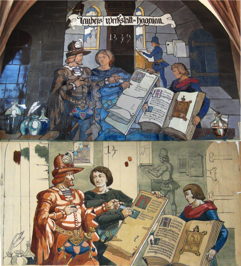 Aquarell, Ende des 19 Jahrhunderts und Mosaik nach dem Aquarell von Léo Schnug, siehe Haguenau 2010 CIMG8191 (40020600813).jpg